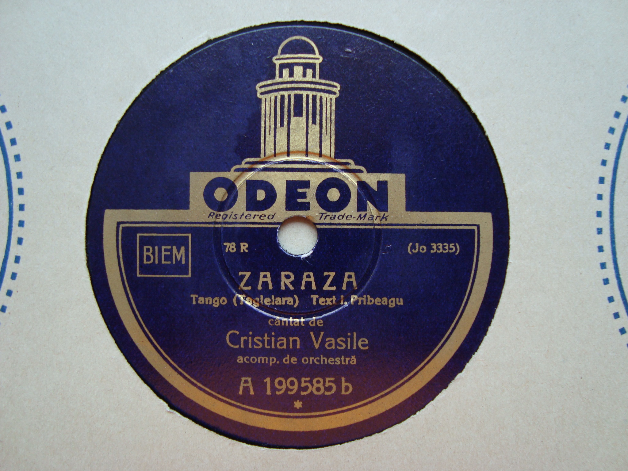 Discul legenda, inregistrat la Berlin in 1931